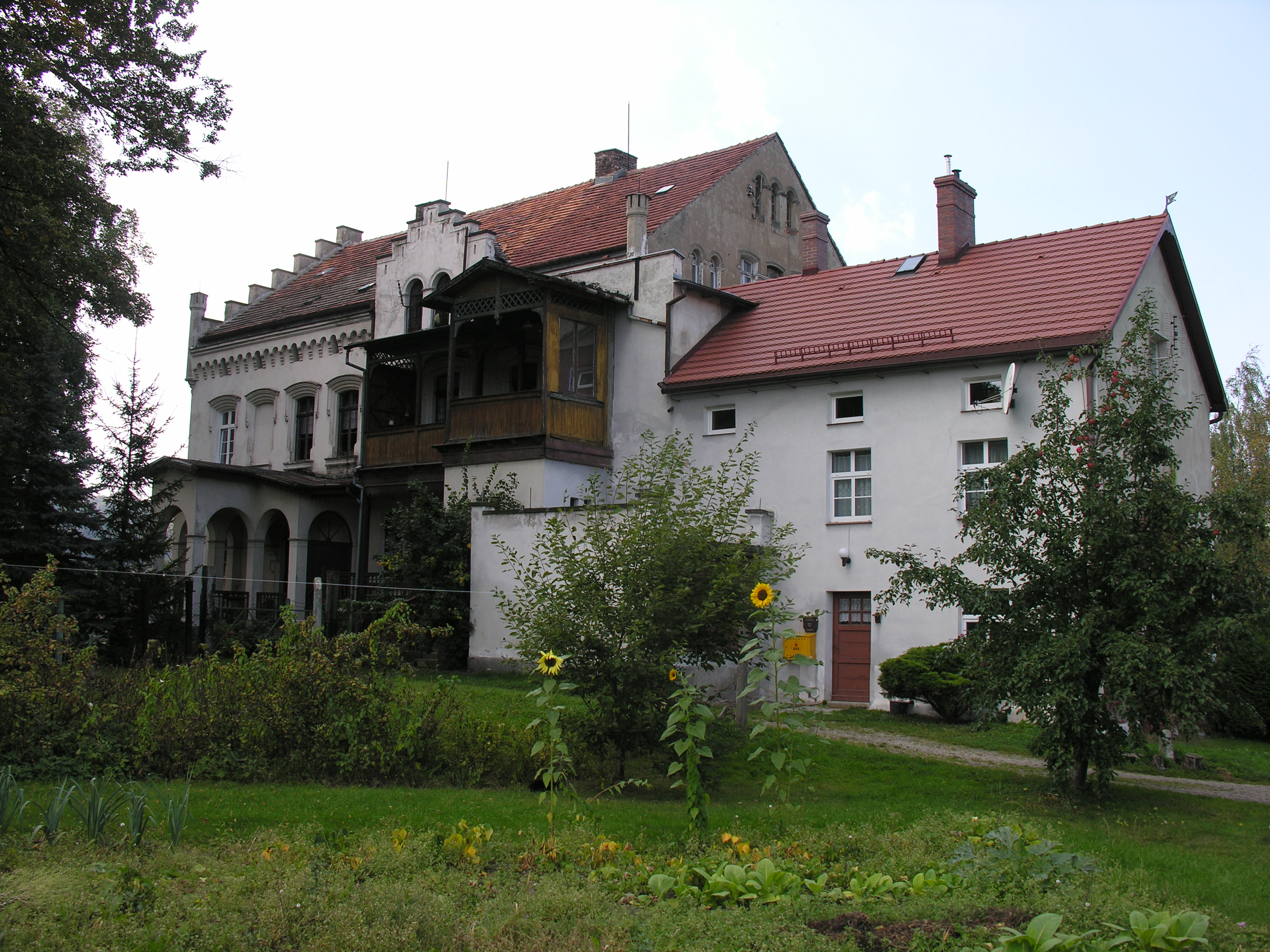 Świebodzice, ul. Sikorskiego 43 - elewacja ogrodowa willi Jana Mikulicza-Radeckiego